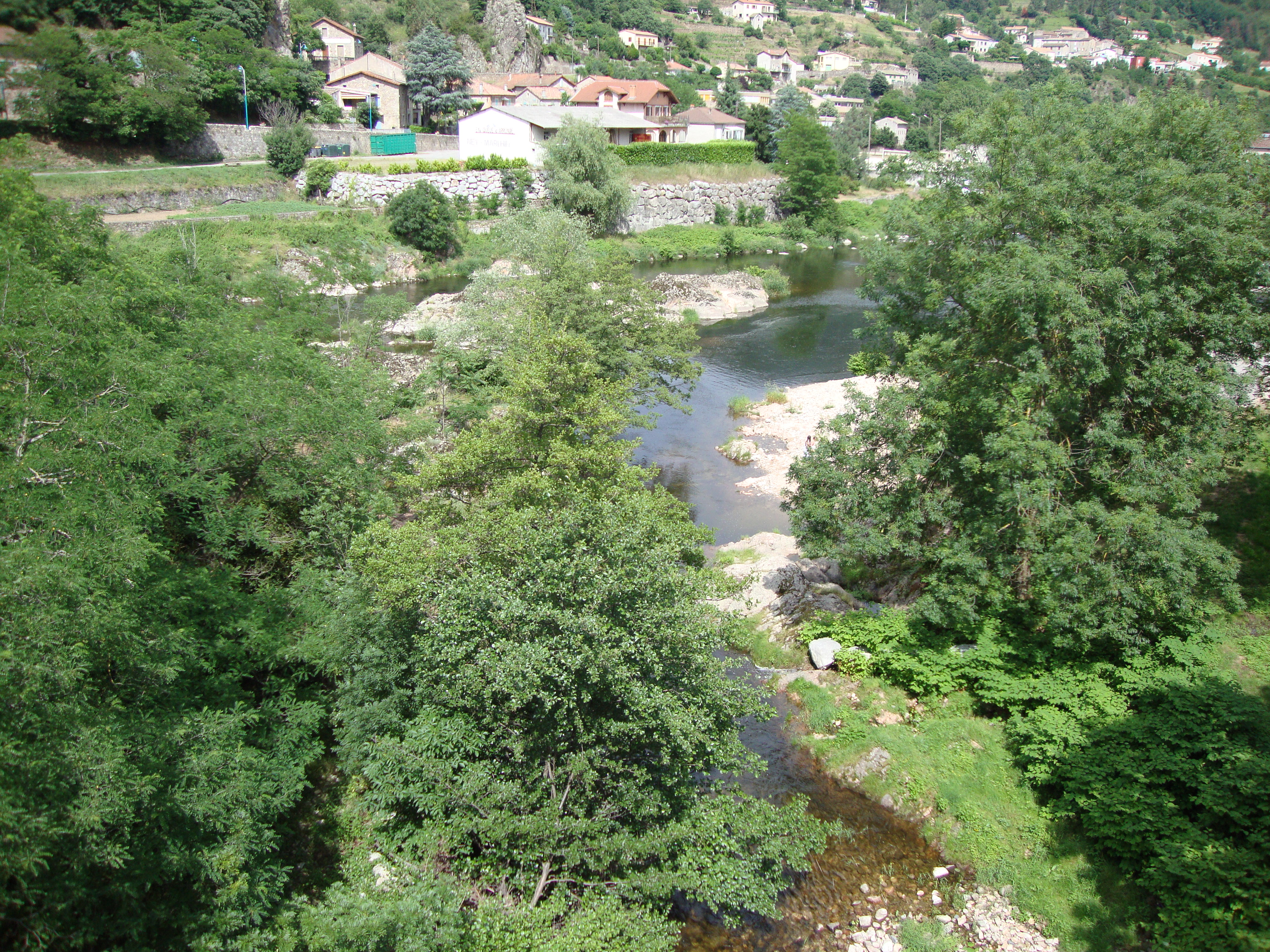 Saint-Sauveur-de-Montagut (Ardèche, Fr) la Glueyre débouchant dans l'Eyrieux.